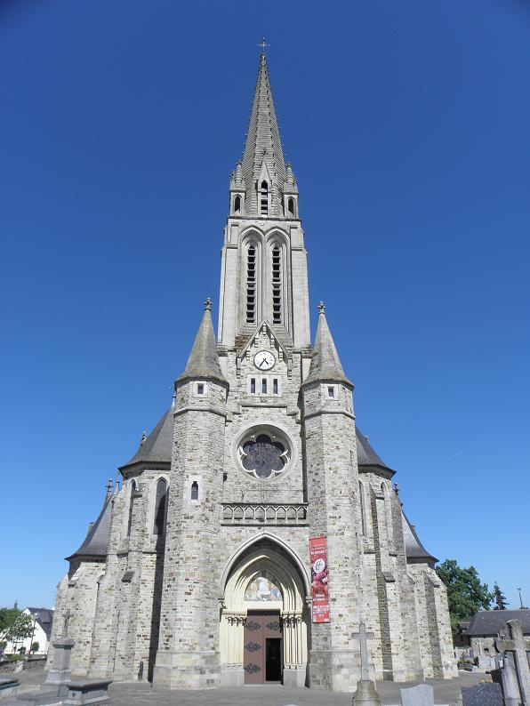 Façade occidentale de l'église Saint-Pierre-et-Saint-Paul d'Étrelles (35).